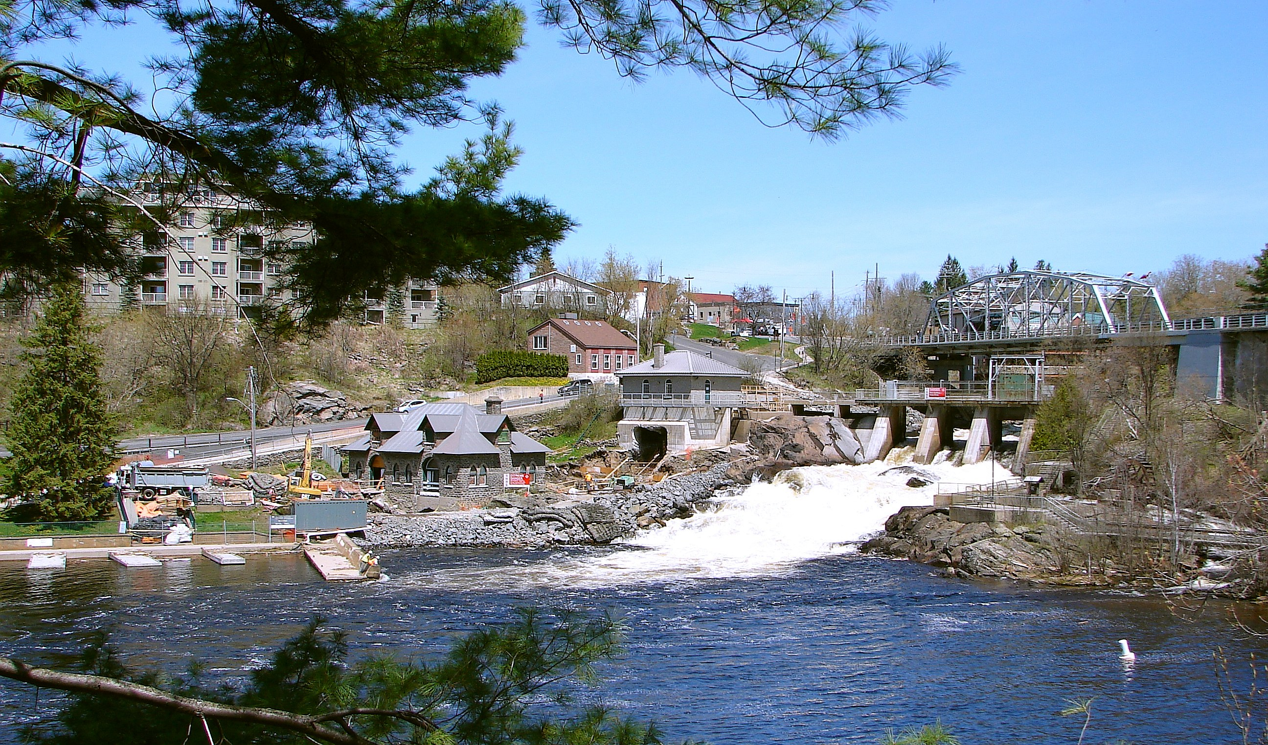 Bracebridge, Ontario, Canada